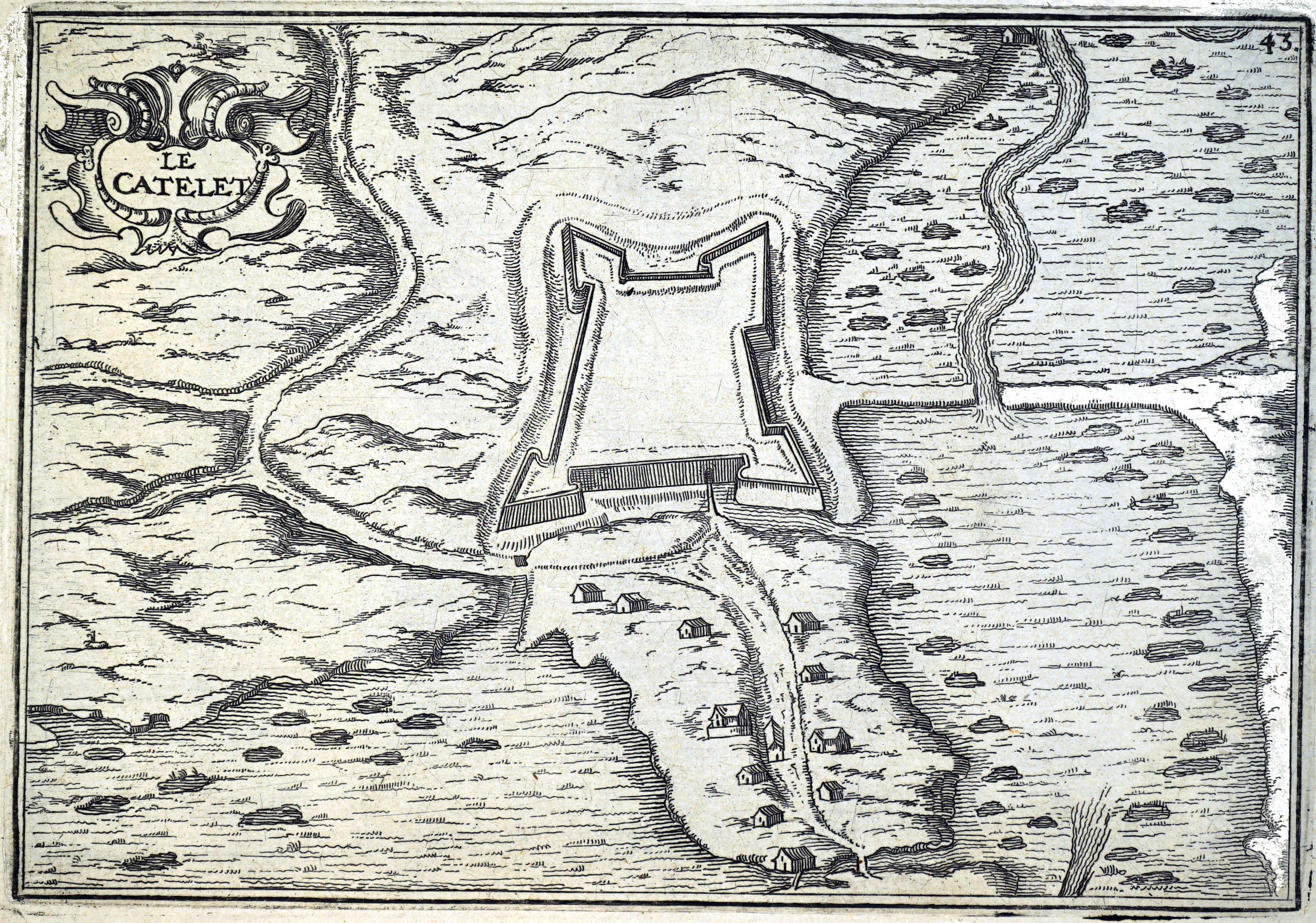 publié par C. Tassin.